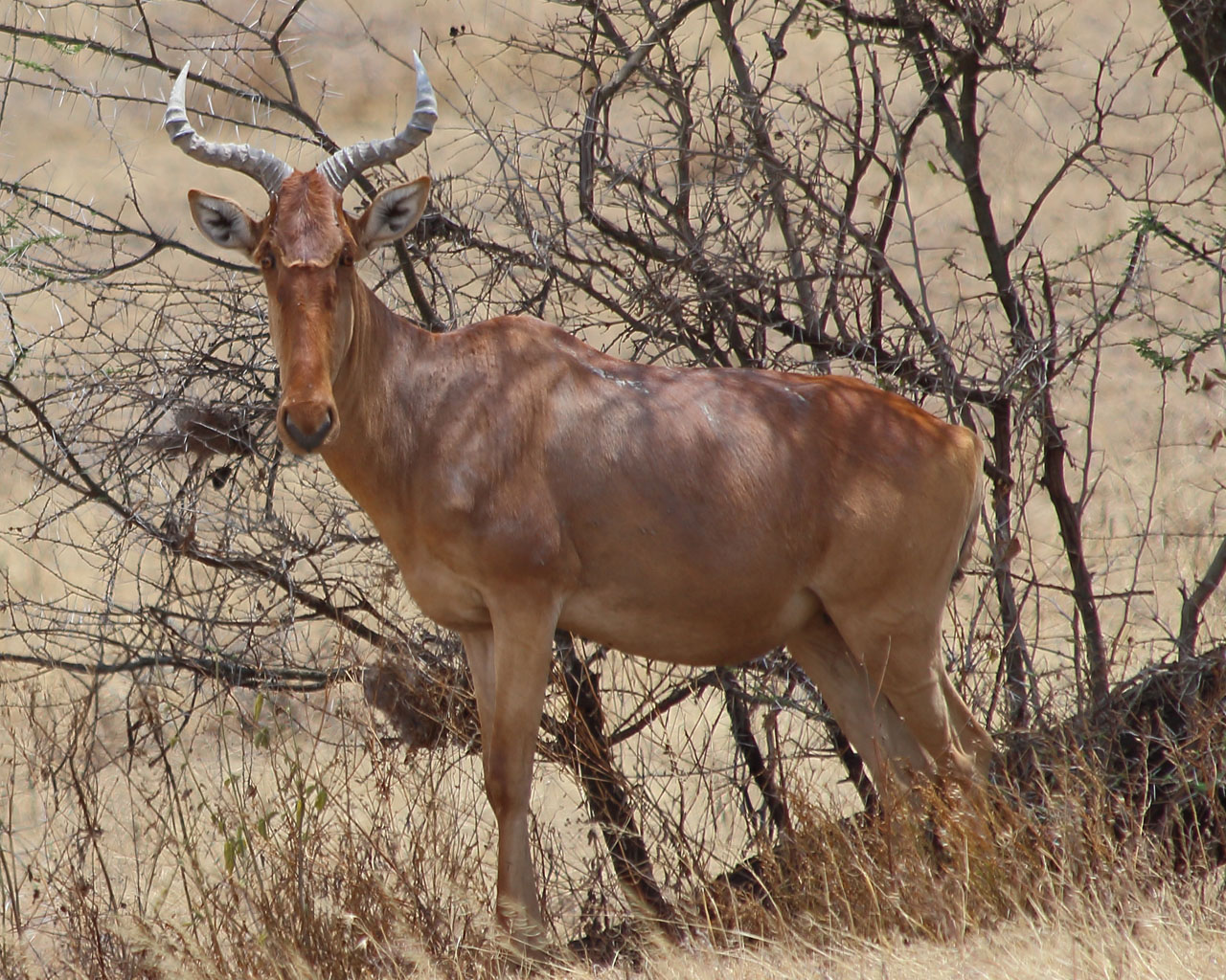 Bubale roux (Bubale de Coke), Serengeti (Tanzanie)